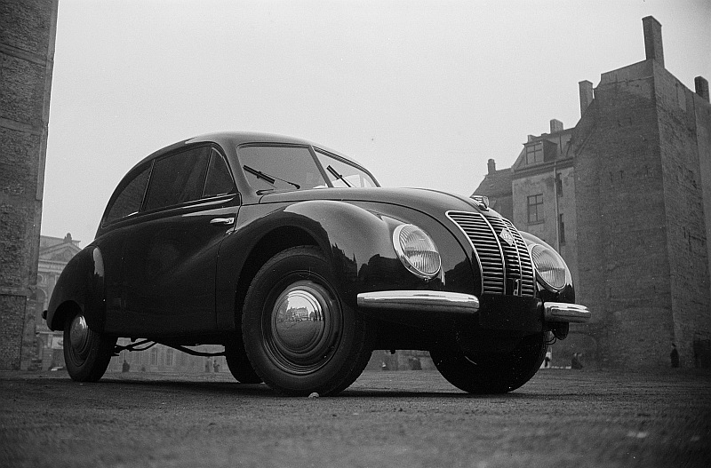 Original image description from the Deutsche Fotothek Ansicht eines IFA F9